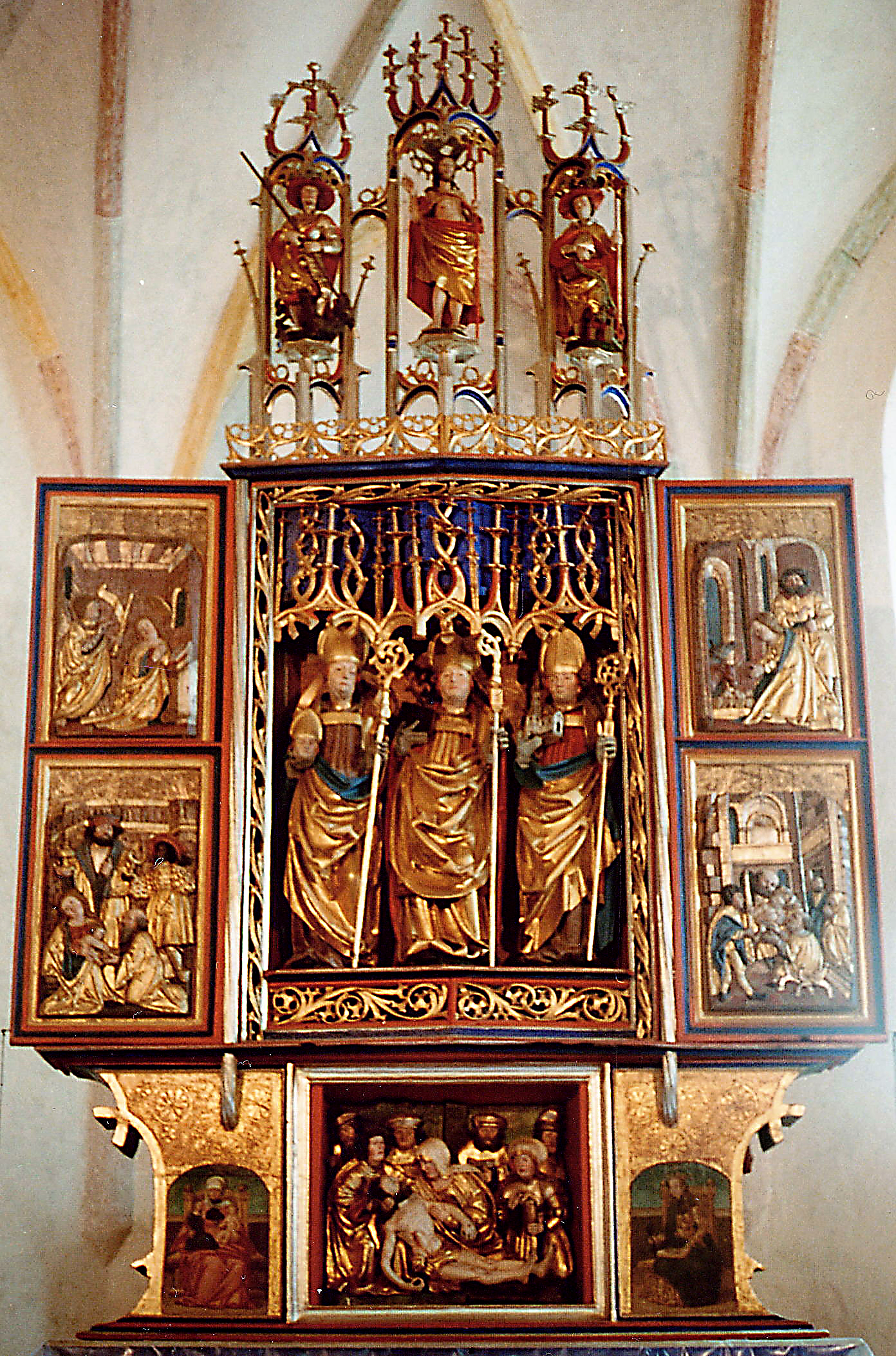 Schleching, Ortsteil Ettenhausen im Chiemgau (Oberbayern). Katholische Kirche St. Servatius auf dem Streichen, Flügelaltar.